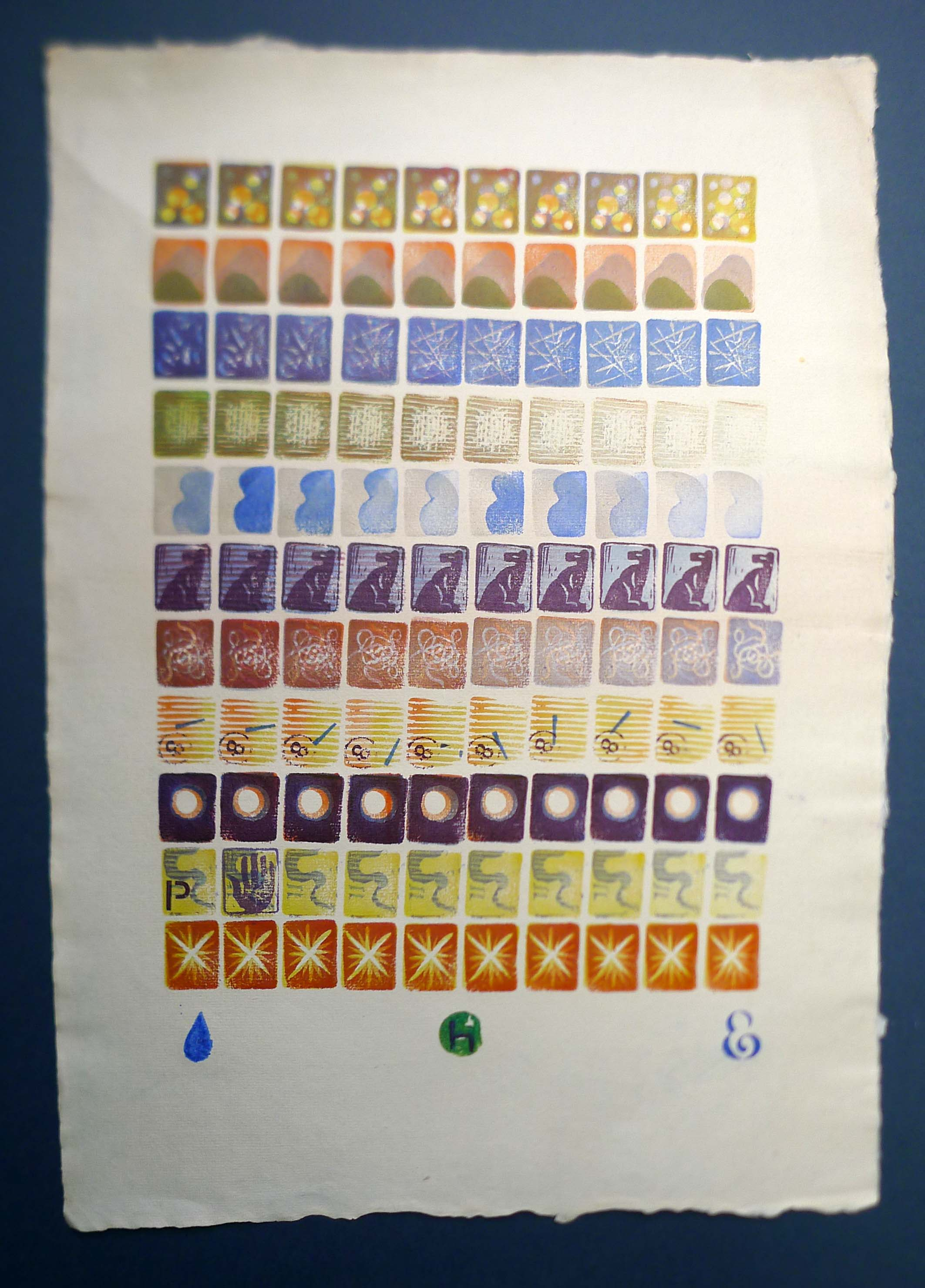 razítka (2017)